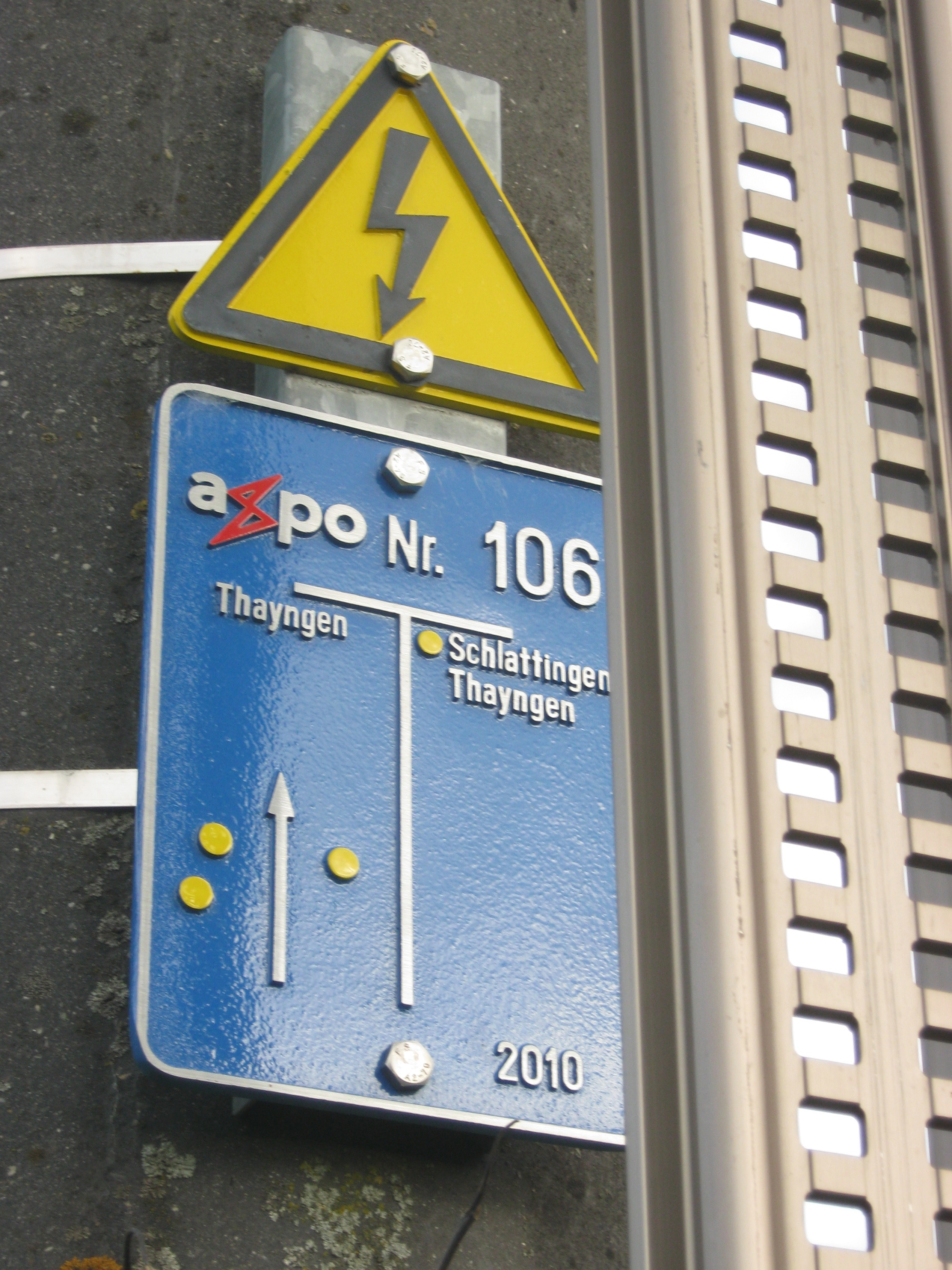 Schild an einem Mast der axpo bei Bietingen (Gottmadingen), 110-kV-Leitung 2010